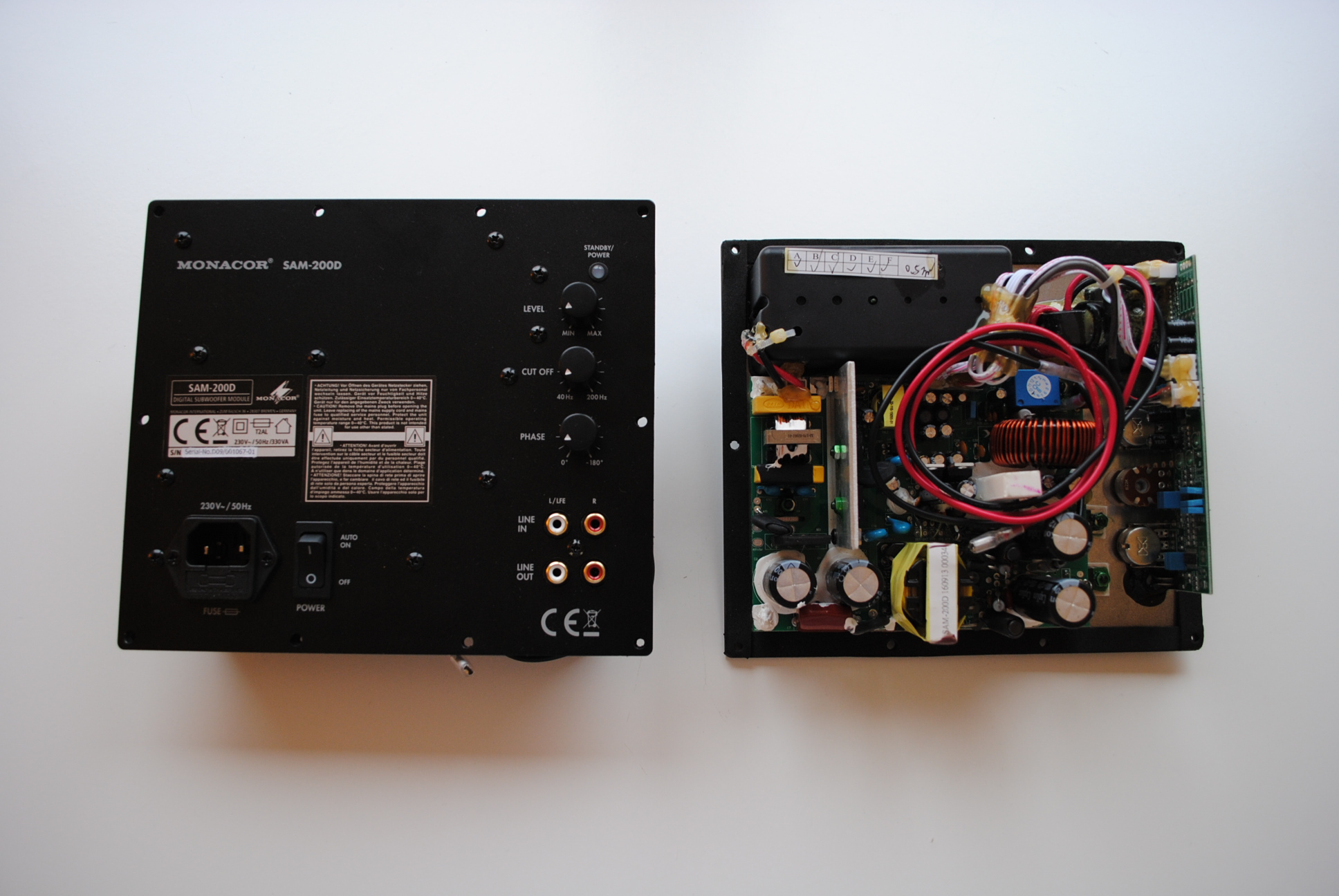 Aktives Subwoofer Modul in Front- und Rückansicht.